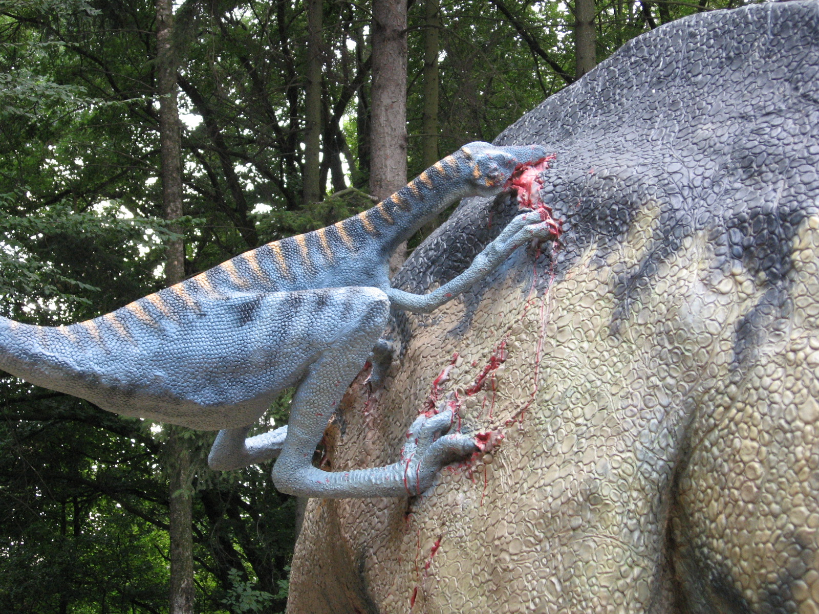 prehist. 04 Troodon(dinopark vyškov cz.)